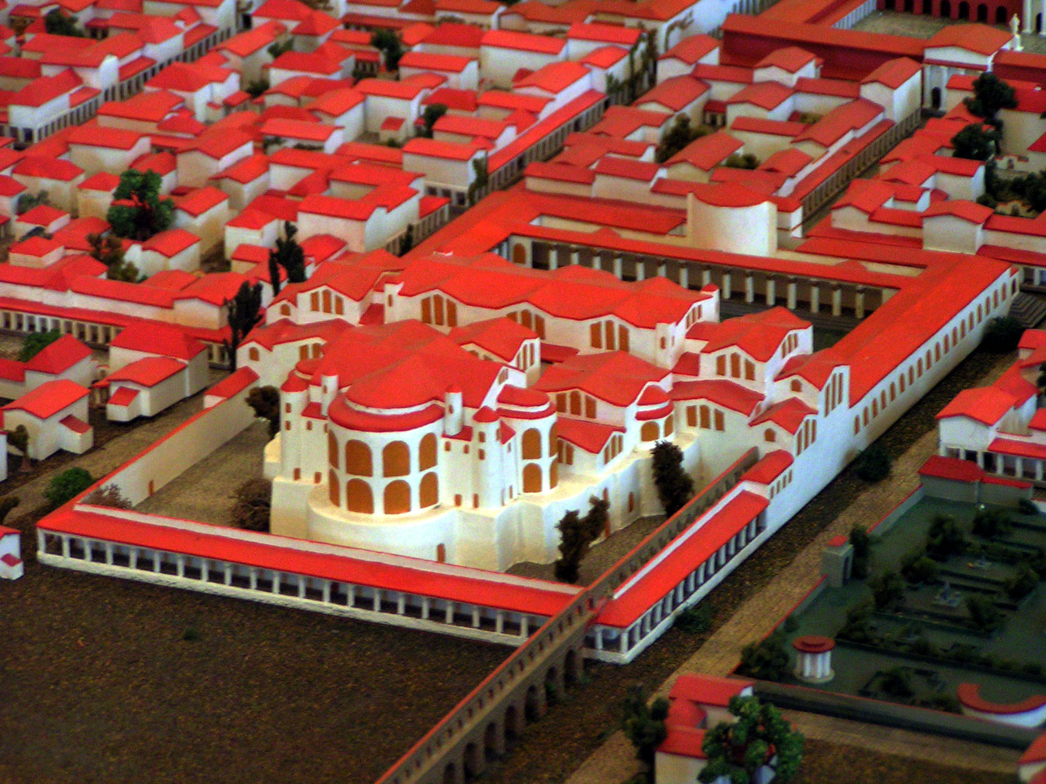 Beschreibung: Trier_Kaiserthermen_Modell Quelle: selbst erstellt im Rheinisches Landesmuseum Trier Fotograf: Stefan Kühn